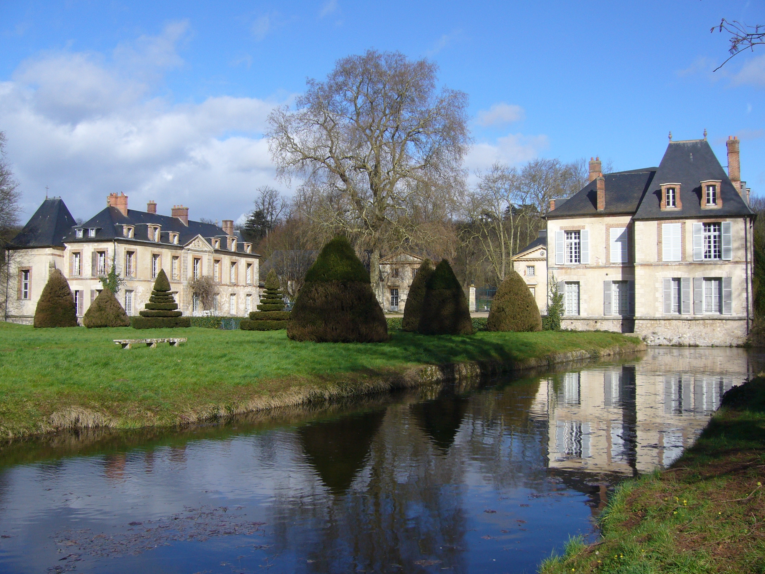 view from the cascades